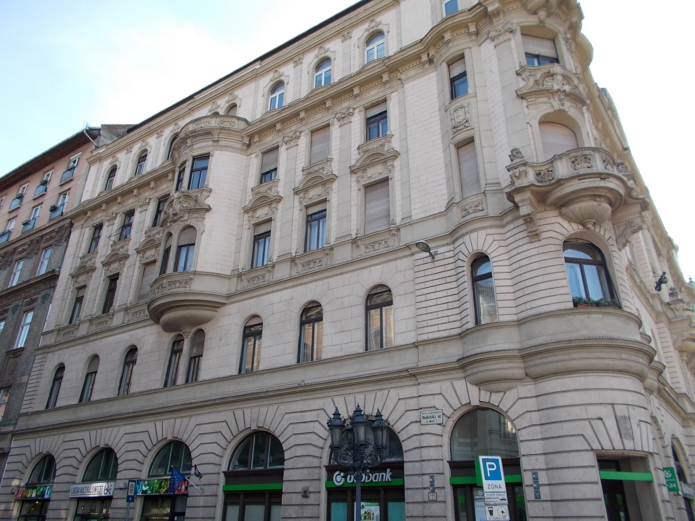 Lakóépület. Budafoki út páratlan oldala a Gellért tértől a Zenta utcáig műemlék ID 8237 - Budapest XI., Budafoki út 1 (Gellért tér sarok)